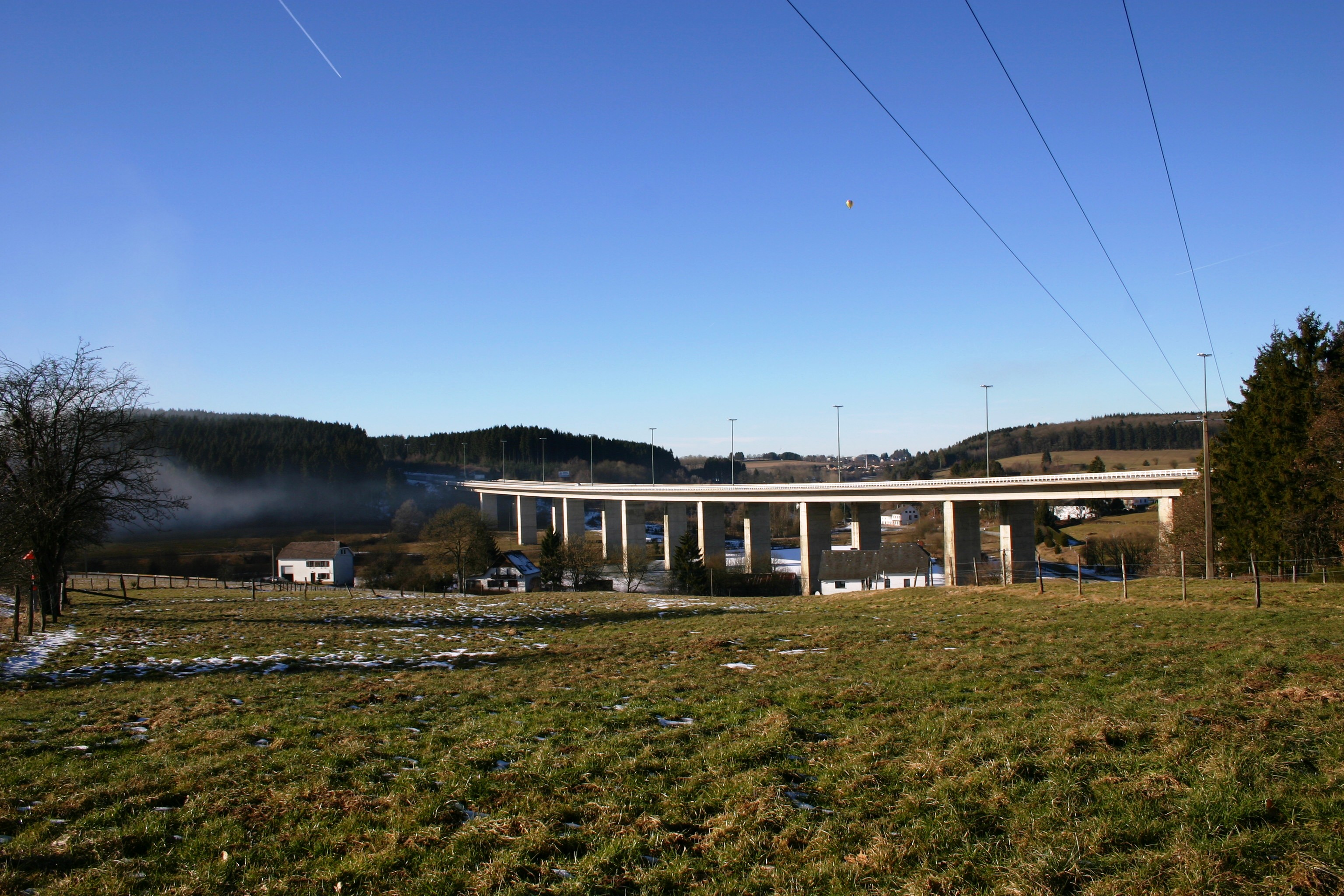 Viadukt vu Breitfeld.